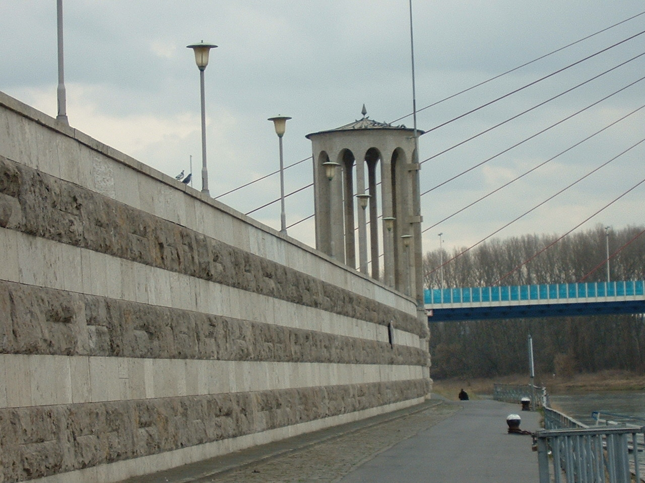 Pegelturm Neuwied, Architekt: Walter Furthmann